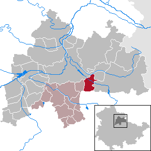 Vogelsberg in Thuringia - District Sömmerda